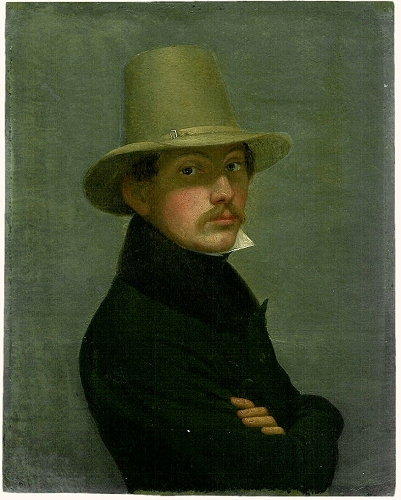 Eduard Daege: Selbstbildnis in jugendlichem Alter. Öl auf Papier, 205 x 163 mm, verso: Stempel »ED« in schwarz, ligiert; von fremder Hand im 20. Jahrhundert beschriftet: »Eduard Daege - Selbstbildnis«